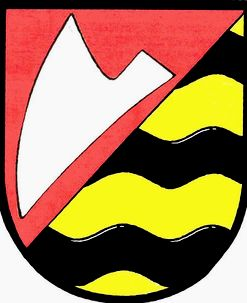 Znak obce Červenka. V červeno-zlatě šikmo děleném štítě je vpravo stříbrná radlice, vlevo tři černá vlnitá břevna.